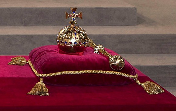 Rijksappel en scepter van het Koninkrijk der Nederlanden